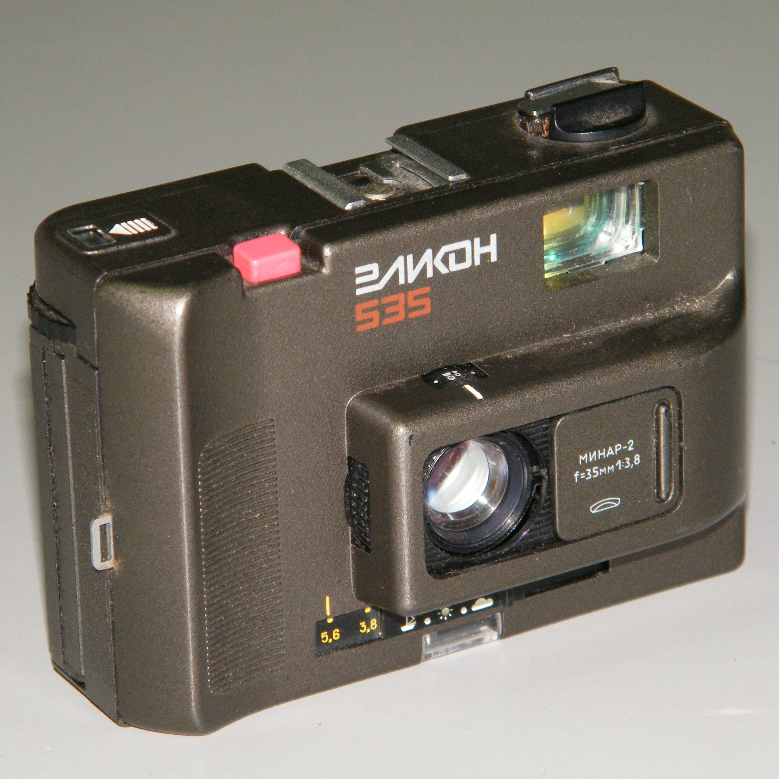 Эликон-535 (БелОМО)